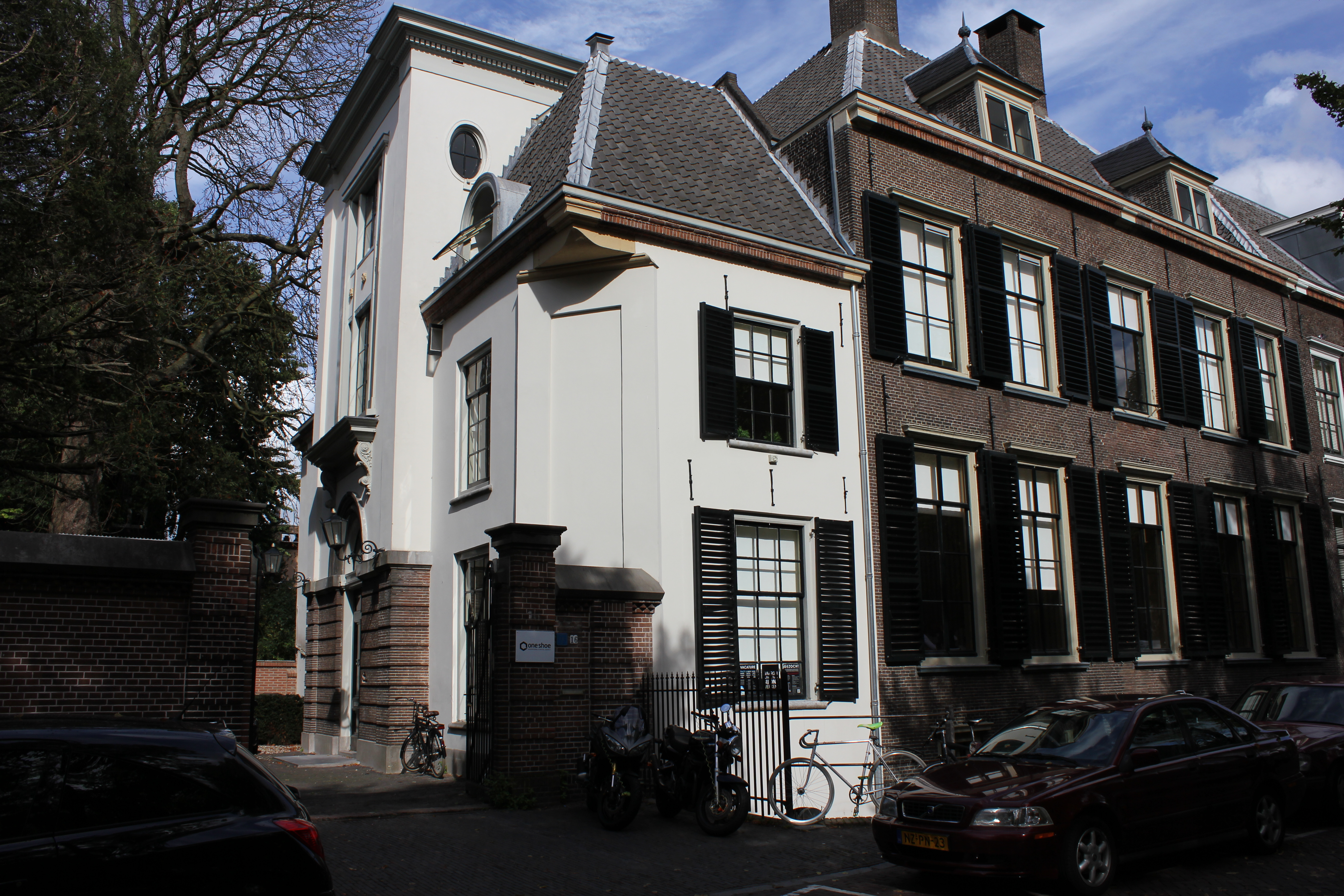 Rijksmonument Janskerkhof 16 in Utrecht